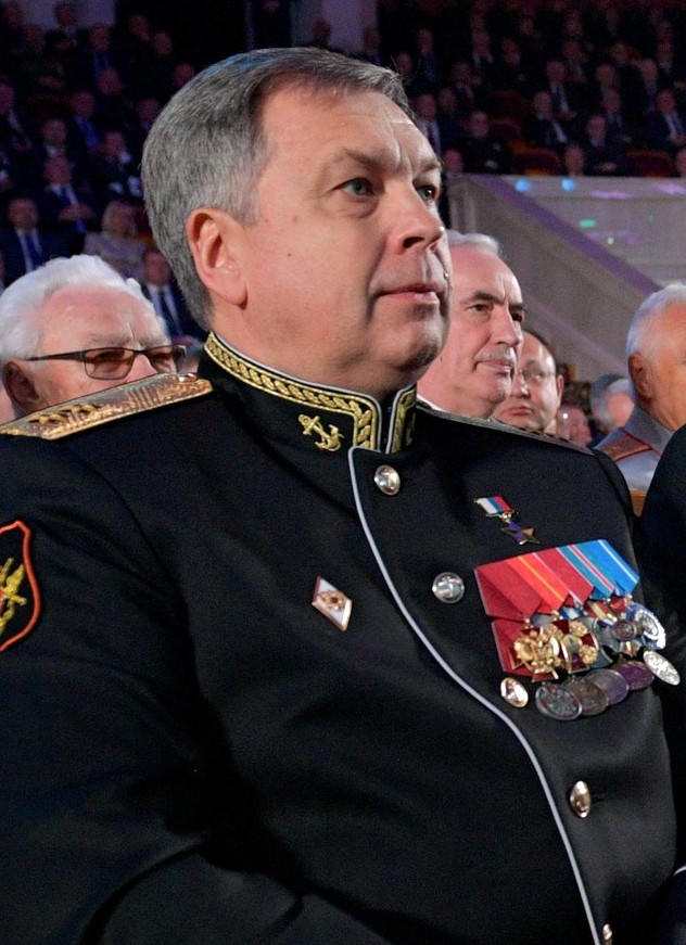 Начальник ГУ Генштаба ВС РФ, Герой Российской Федерации вице-адмирал Игорь Костюков